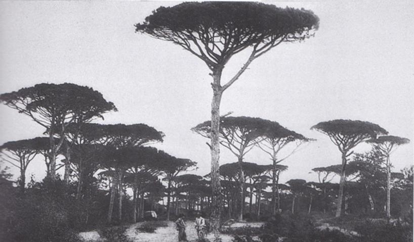 La Pineta di Classe in una foto Alinari di fine Ottocento.